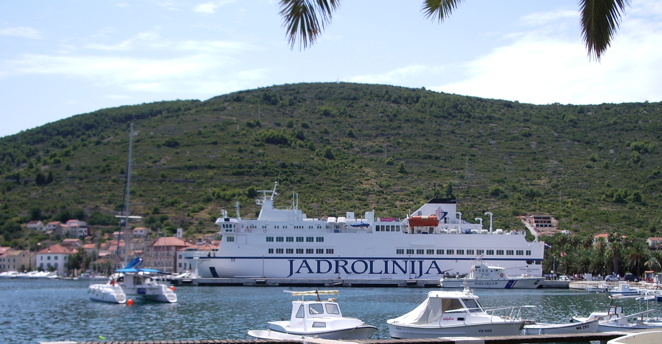 Jadrolinijin trajekt Petar Hektorović u luci Vis